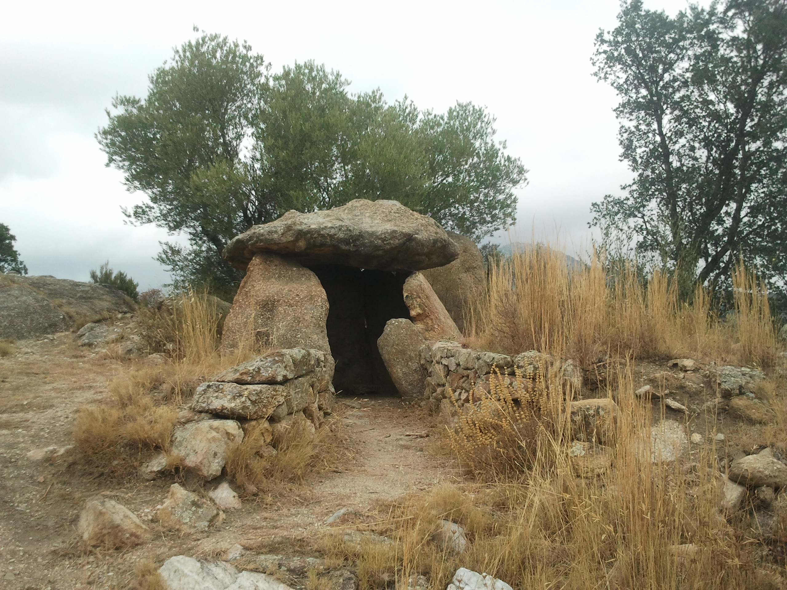 Dolment de la Gutina, situat al terme municipal de Sant Climent Sescebes, Alt Empordà.